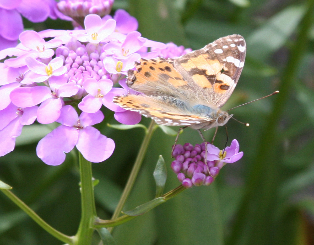 Schmetterling, Distelfalter (Painted Lady), nimmt mit seinem Rüssel Blütennektar von einer lila Blume auf.